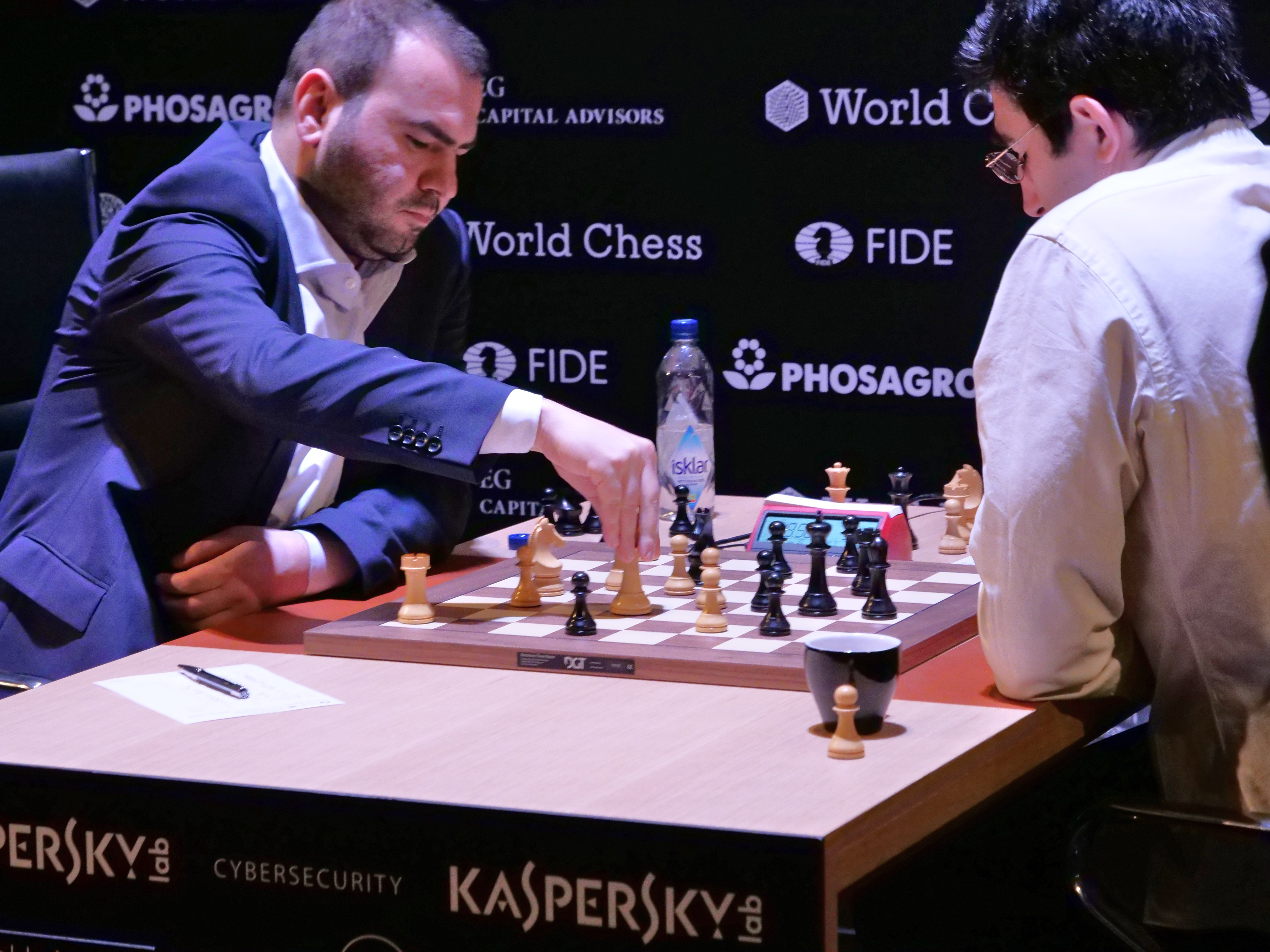 Məmmədyarov (li.) und Kramnik, Kandidatenturnier Berlin 2018, 6. Runde